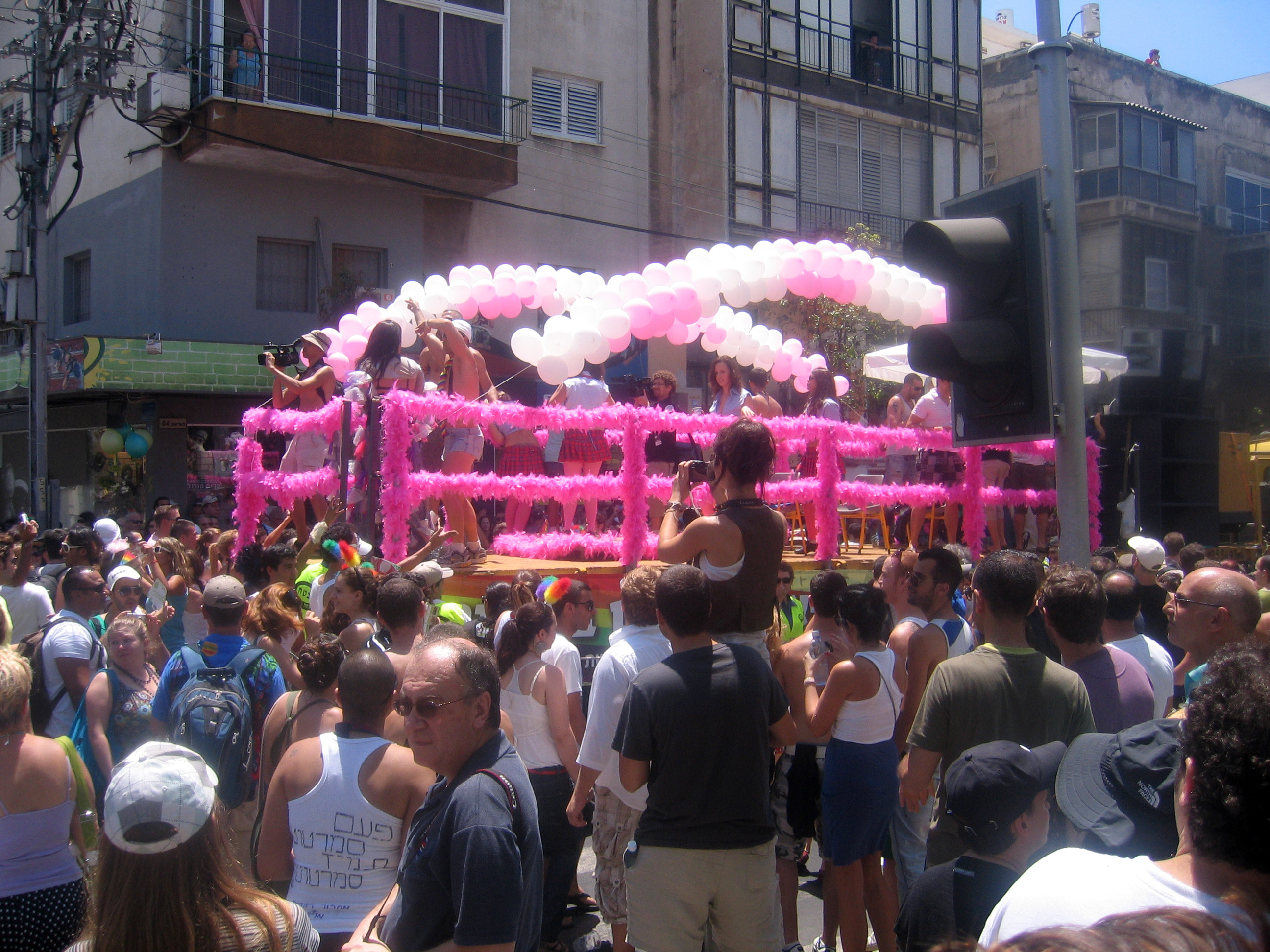 משאית במצעד ברחוב בוגרשוב